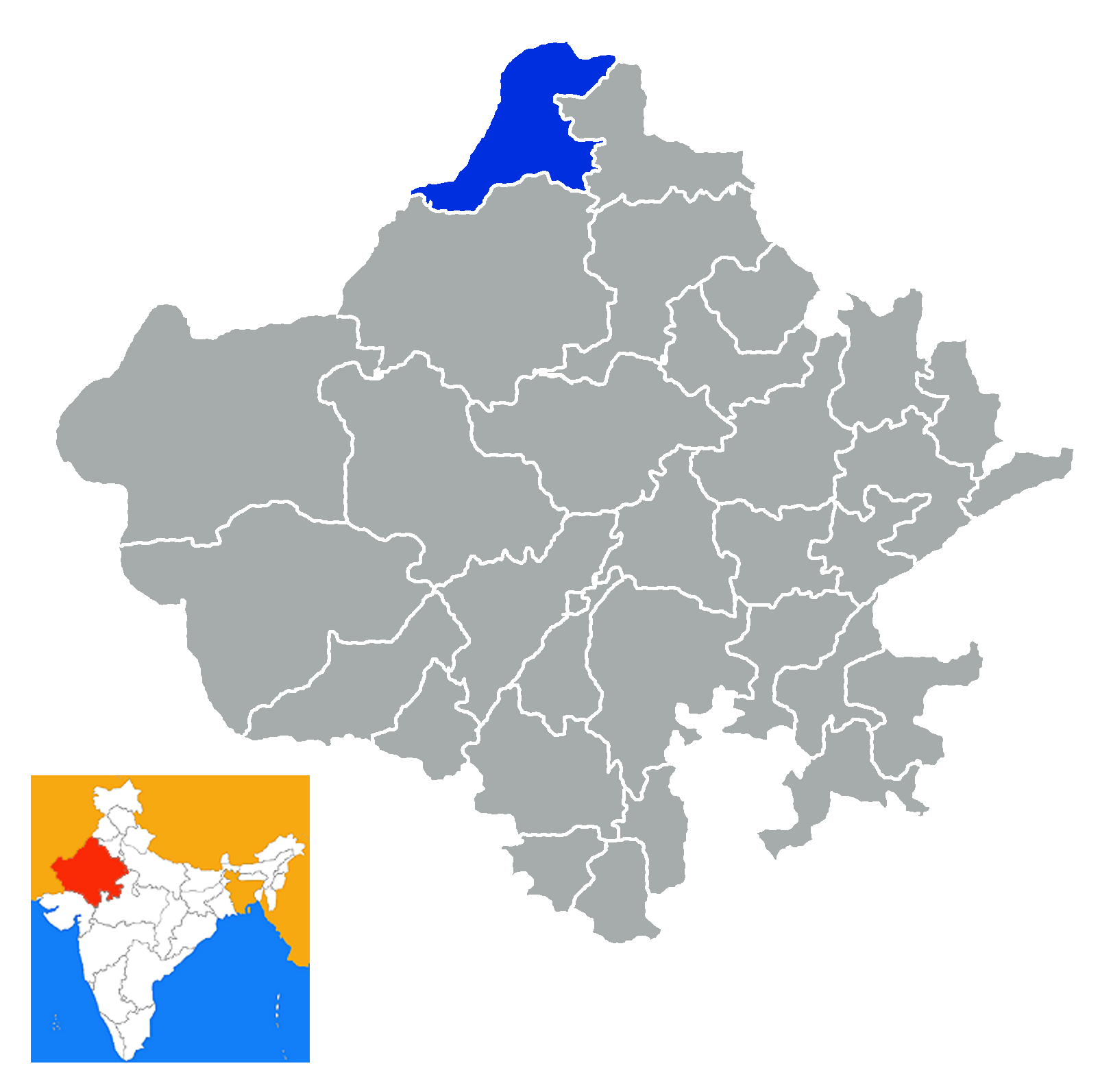 Distrito de Ganganagar Rajastan India